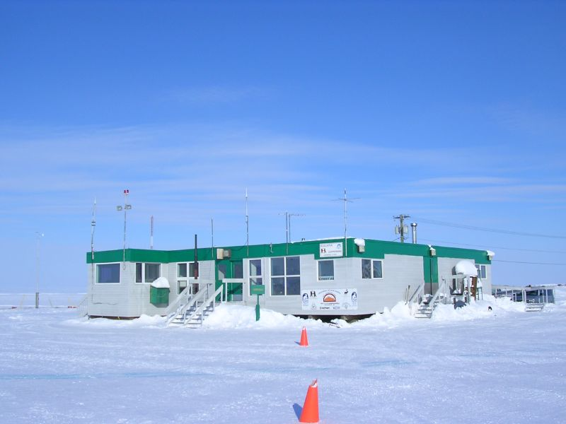 Airport Terminal - Kugluktuk, Nunavut, Canada